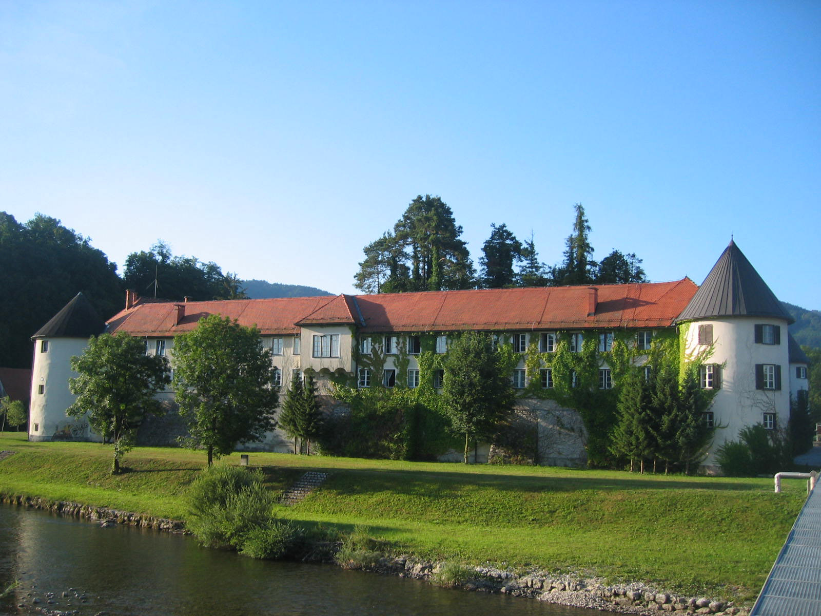 Vrbovec castle in Nazarje, Slovenia